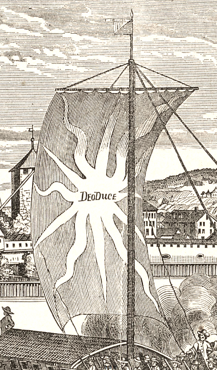 Neptun (1693) Kopie nach dem Neujahrsblatt der Constaffler und Feuerwerker im Zeughaus von Johannes Meyer aus dem Jahr 1694, detaillerte Beschreibung siehe Scan vom Buch